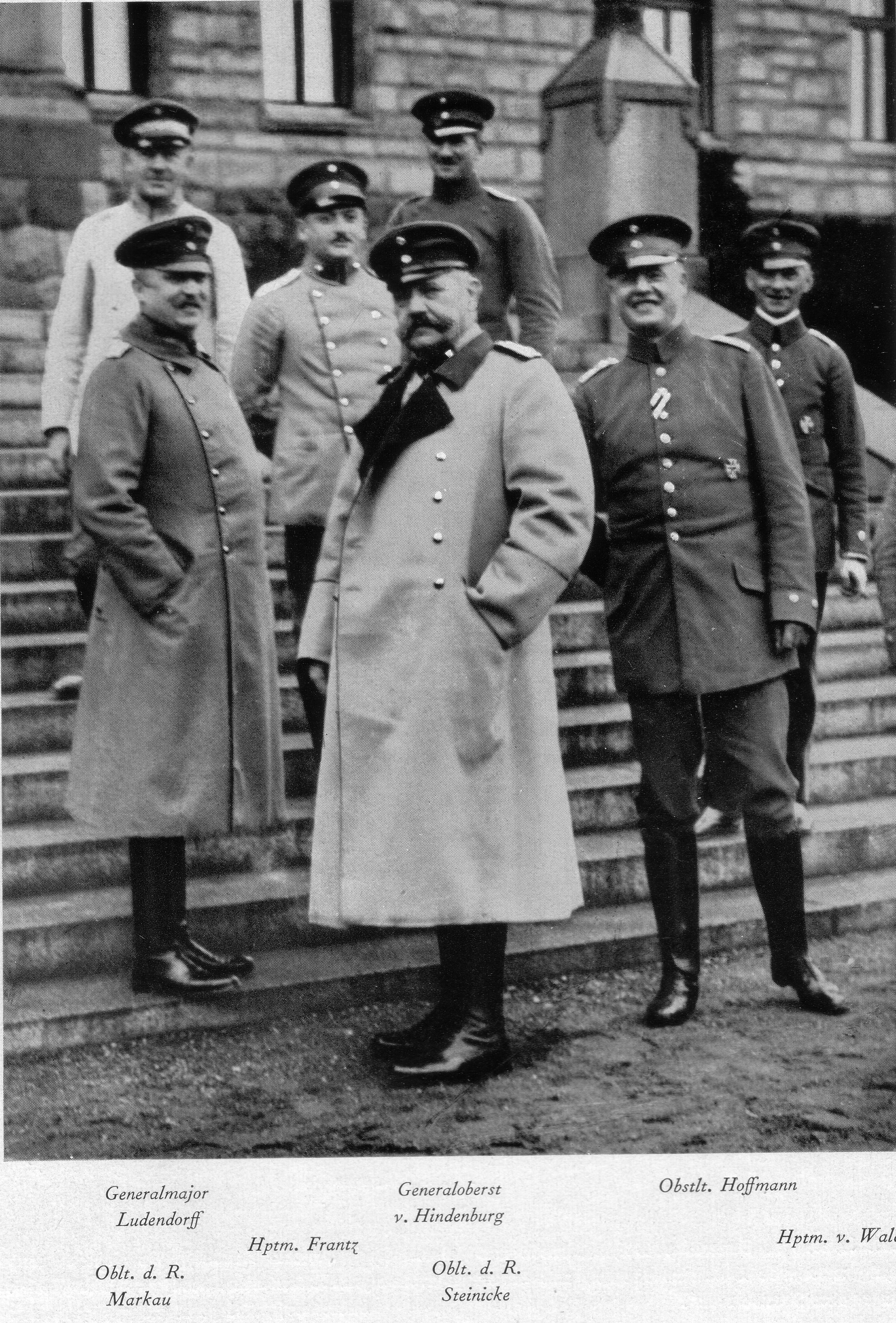 Der Stab der 8.Armee im Herbst 1914 vor dem Posener Schloss